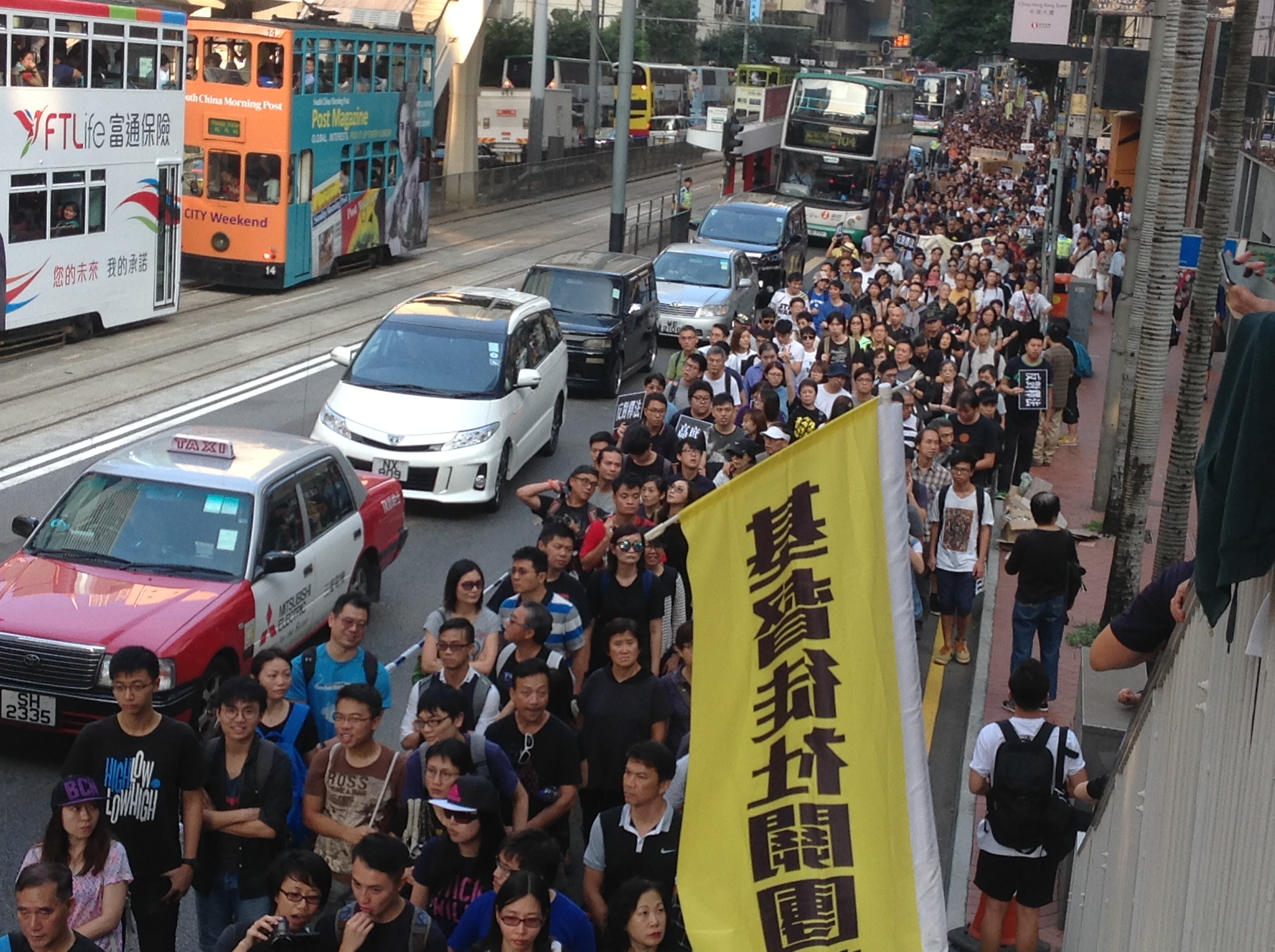 在中國人大常委會11月7日將就香港青年新政兩位議員宣誓風波，對基本法有關宣誓條例宣布釋法內容之際，香港民間人權陣線星期天發起各界“反對釋法大遊行”和集會，抗議人大在香港高等法院審理有關宣誓風波司法覆核案期間，主動對基本法第104條釋法，破壞香港獨立的司法制度。 在香港民陣發起反釋法大遊行後，數以千計的示威者繼續遊行到西環的中聯辦抗議人大釋法。8點半左右，示威者手舉雨傘再次沖擊警方防線，警方則狂噴辣椒噴劑還擊。警方調派大批警員增援，並將配備防暴頭盔的警員派至一線與示威者對峙。警方不斷呼籲示威者保持冷靜，不要衝擊警方防線，要求示威者盡快離開。 9點前，在中聯辦外與警察對峙的示威者突然撤離，輕往西區警署外的徳輔道西和西邊街道口，現場雙向交通中斷，一場自2014年雨傘運動後的佔領行動在醞釀中，現場至少有幾千之。十多分鐘後，警方開始廣​​播，要求佔路人士離開。 示威者在9點過後佔據了中聯辦外一段德輔道，並在中聯辦後門外與警方防線展開推撞，警方用辣椒噴霧還擊將示威者防線推後。示威者不斷呼喊反對釋法。 警方在中聯辦西邊的朝光街路口佈署第二道防線，並有警員從路旁的西區警署裡向警察傳遞防暴盾牌進一步部署防線。目前還不清楚警方何時清場。